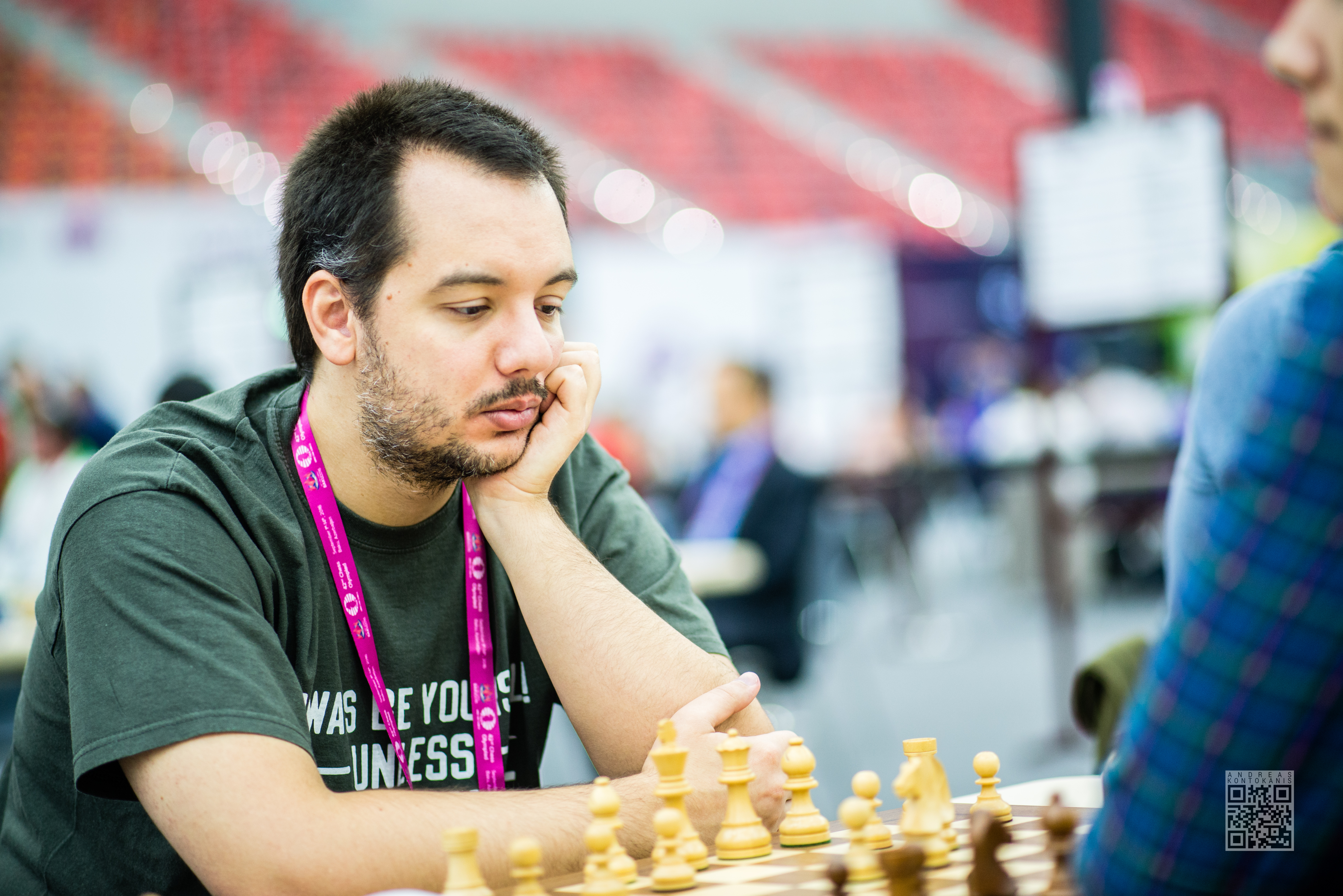 Mastrovasilis Dimitrios-2